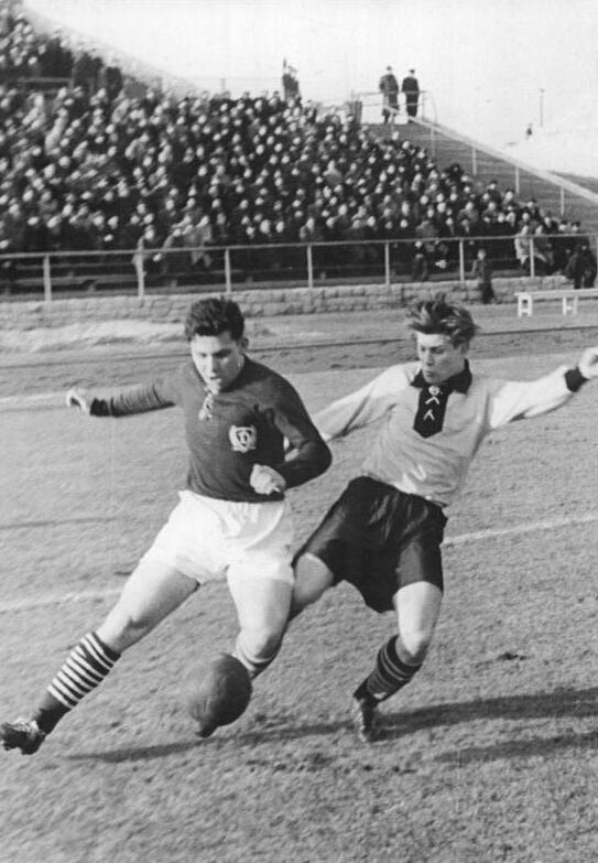 Zentralbild-Beyer Bey-Krz. 11.3.1956 Briesker Überraschungssieg beim Punktspielauftakt - Am Sonntag, dem 11.3.1956, begann die Punktspielsaison der Fußballer. Im Berliner Walter-Ulbricht-Stadion standen sich am ersten Spieltag Dynamo Berlin und Aktivist Brieske gegenüber. Dabei gab es die erste Überraschung, denn der favorisierende Gastgeber musste mit 2:1 die Überlegenheit von Aktivist anerkennen. UBz: Brieske ist durchgebrochen, aber bevor Rechtsaußen Pietrczak (rechts) flanken kann, hat ihm der Dynamoverteidiger Bock das Leder abgejagt.